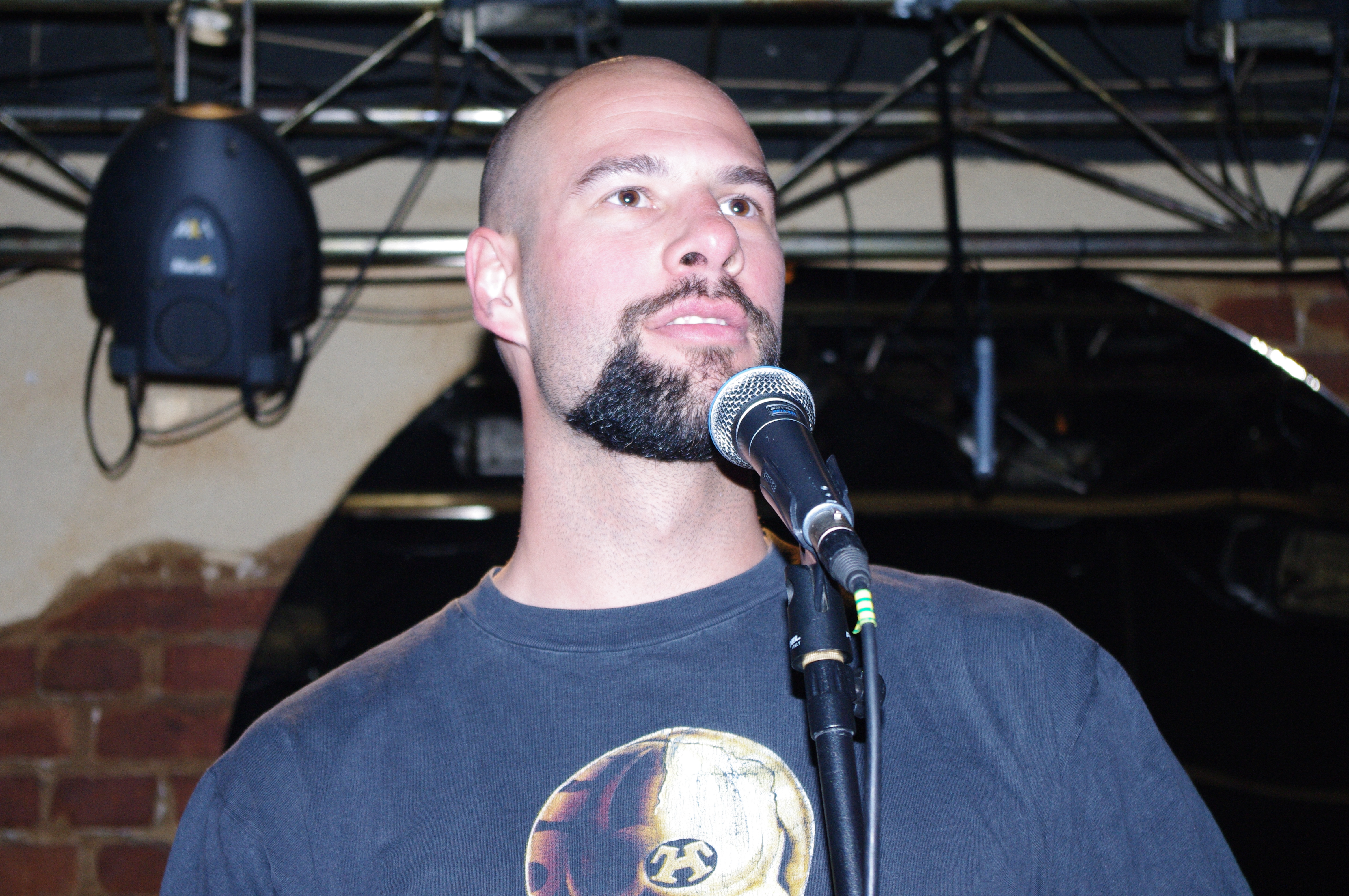 Деян Каменов - финален концерт на "Голямото междучасие"